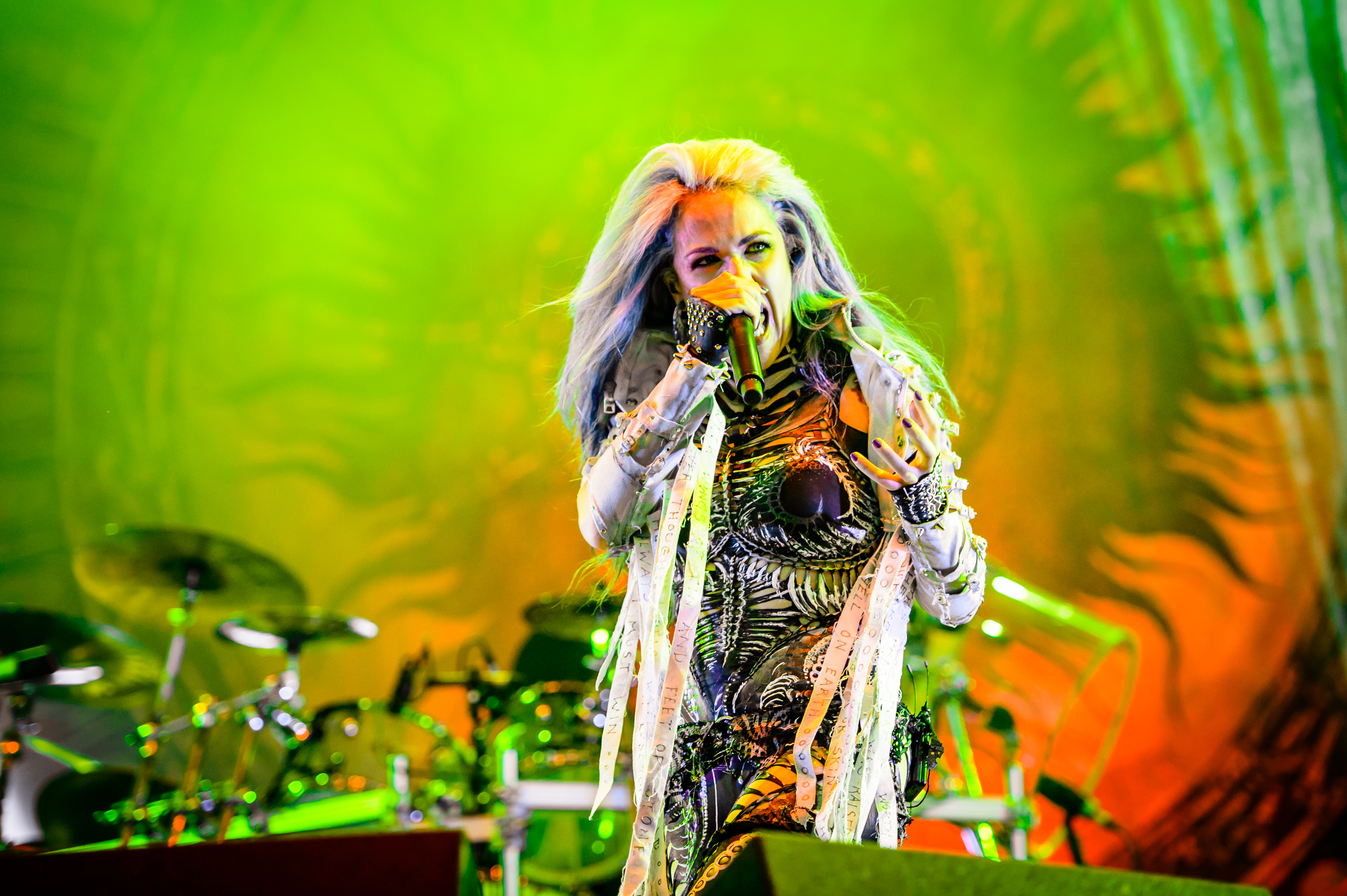 'RockHarz Open Air 2017; Ballenstedt': 'Arch Enemy'